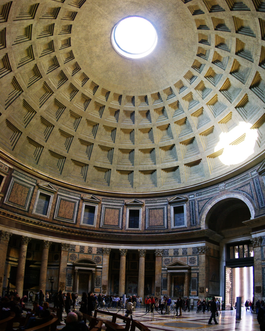 Pantheon, Kuppel, Rom